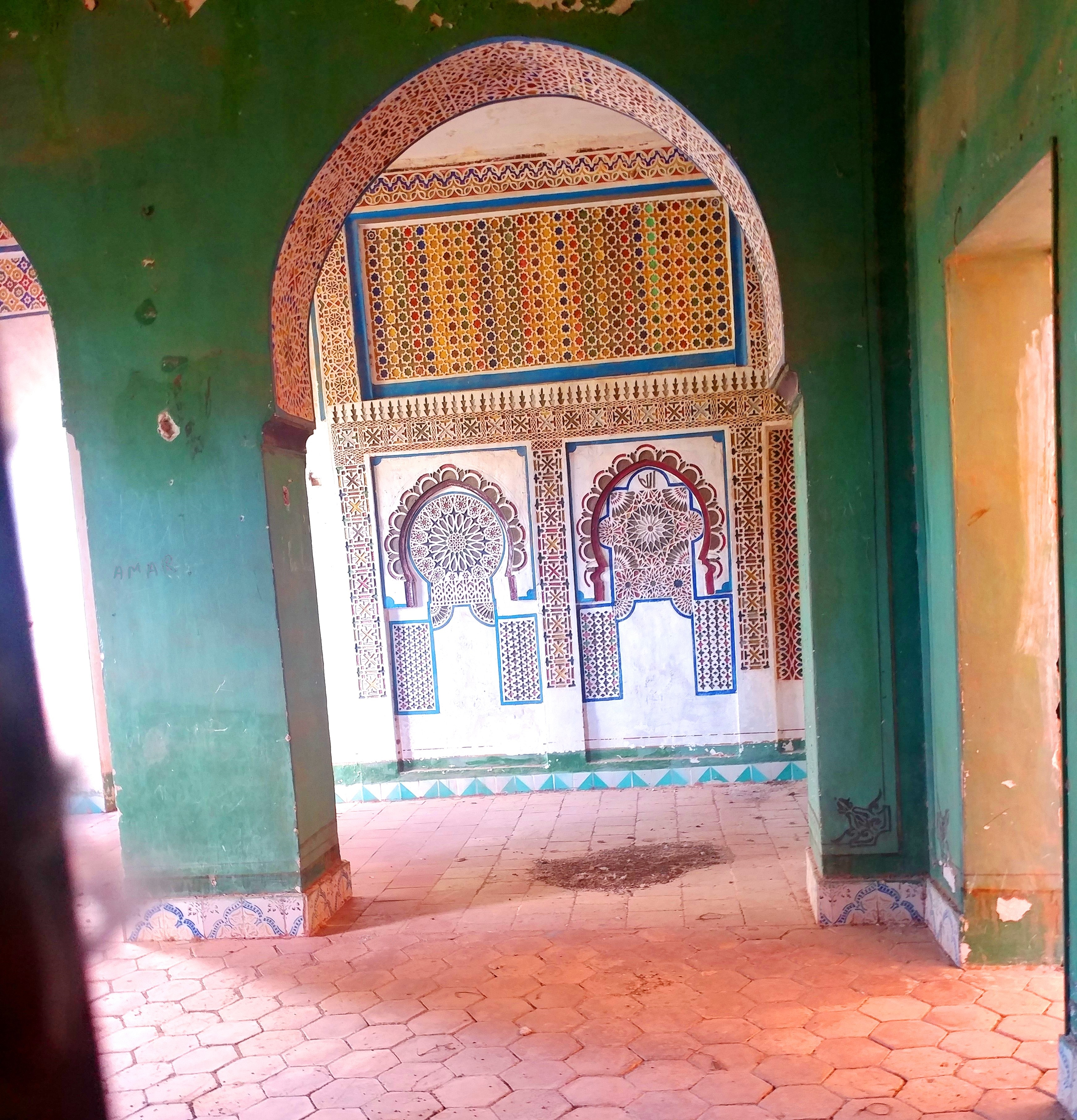 هذه الصورة التقطتها شخصيا من أحد قصور عين ماضي بالأغواط الجزائرية.